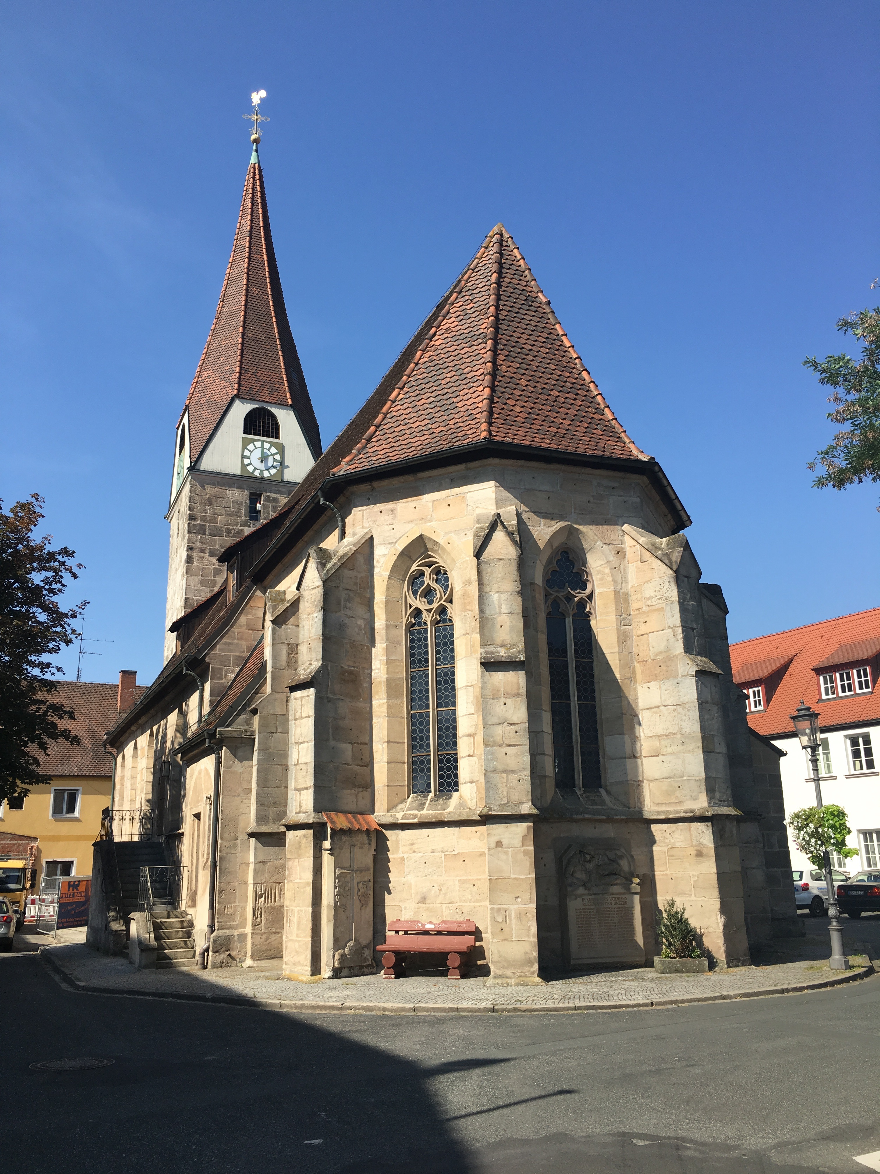 Baiersdorf Pfarrkirche St. Nikolaus